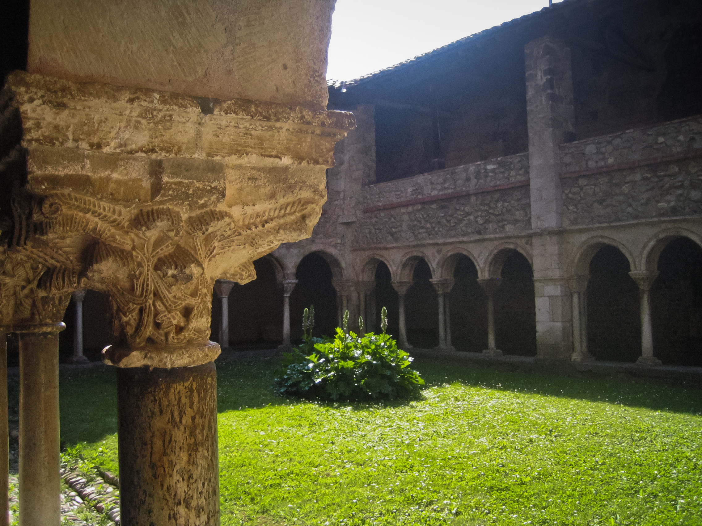 Cloître de la cathédrale Saint-Lizier à Saint-Lizier (Ariège, France).